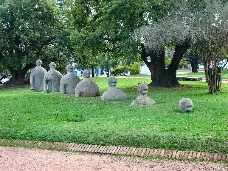 Escultura Desterrando, por Jorge Abbondanza y Enrique Silveira (1996). Ubicada en el Parque de las Esculturas, Bolívar, Montevideo, Uruguay.